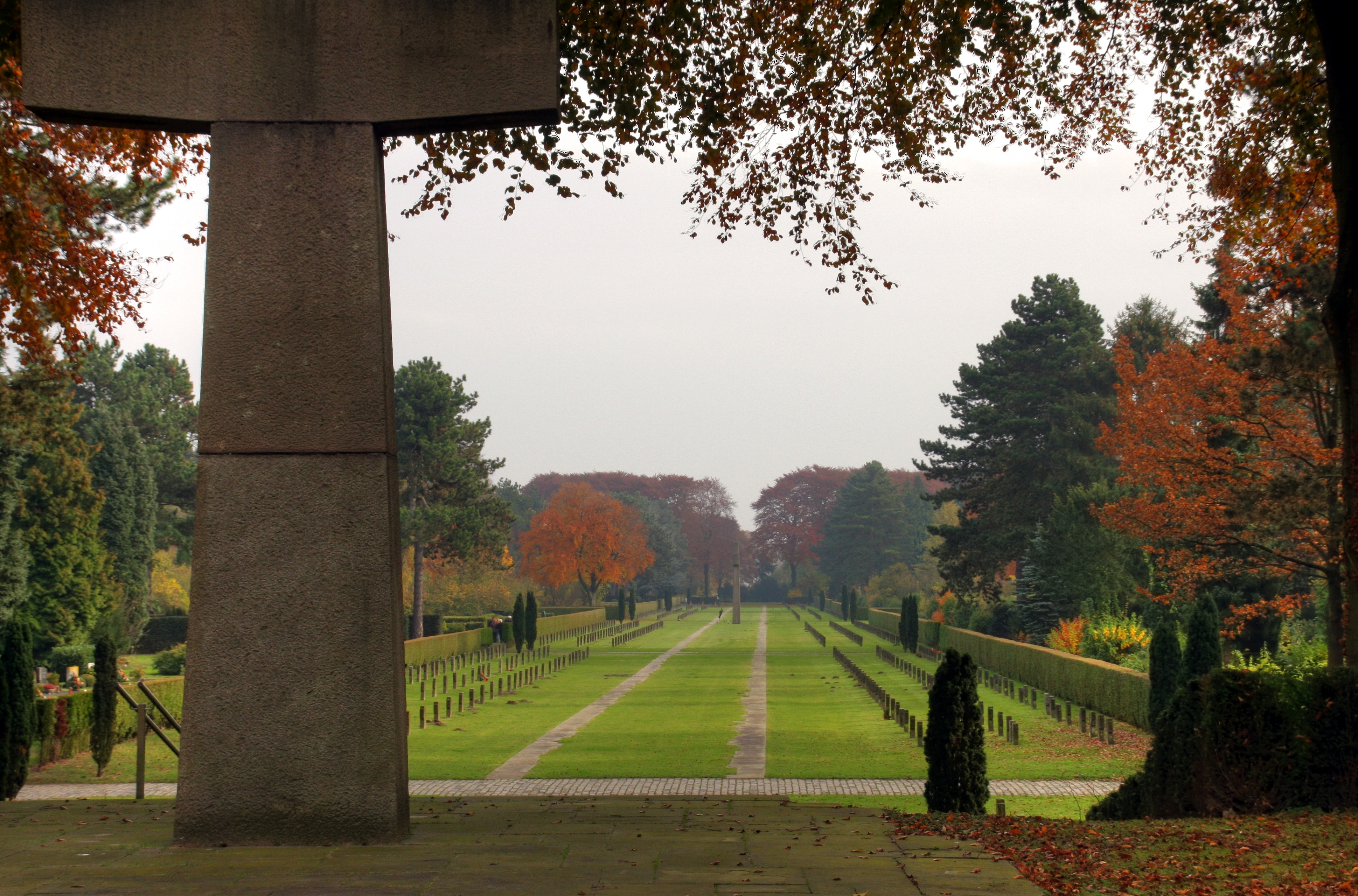 Südfriedhof Köln. Blick vom südwestlichen Hochkreuz über Kriegsgräber.